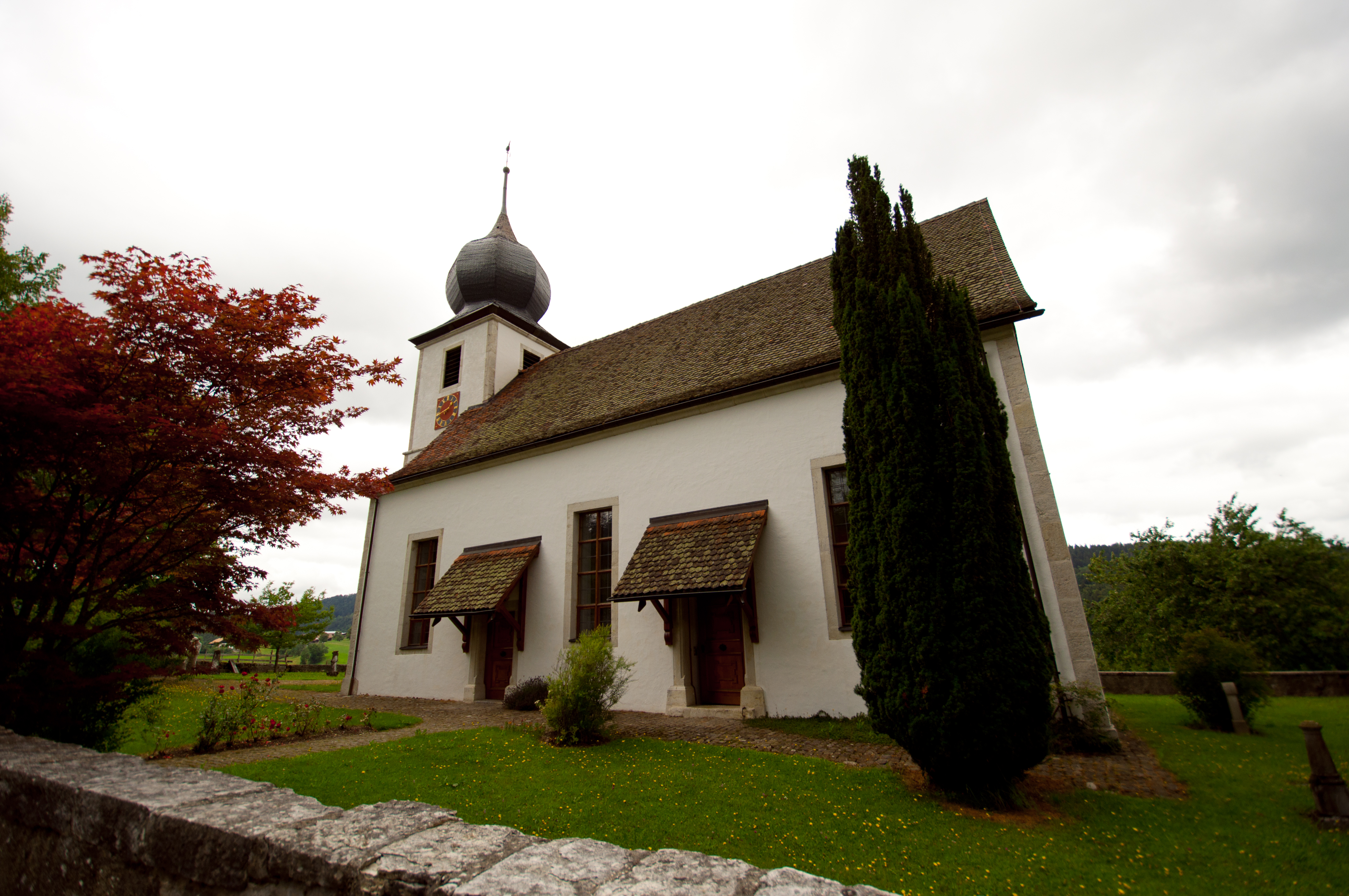 Reformierte Kirche